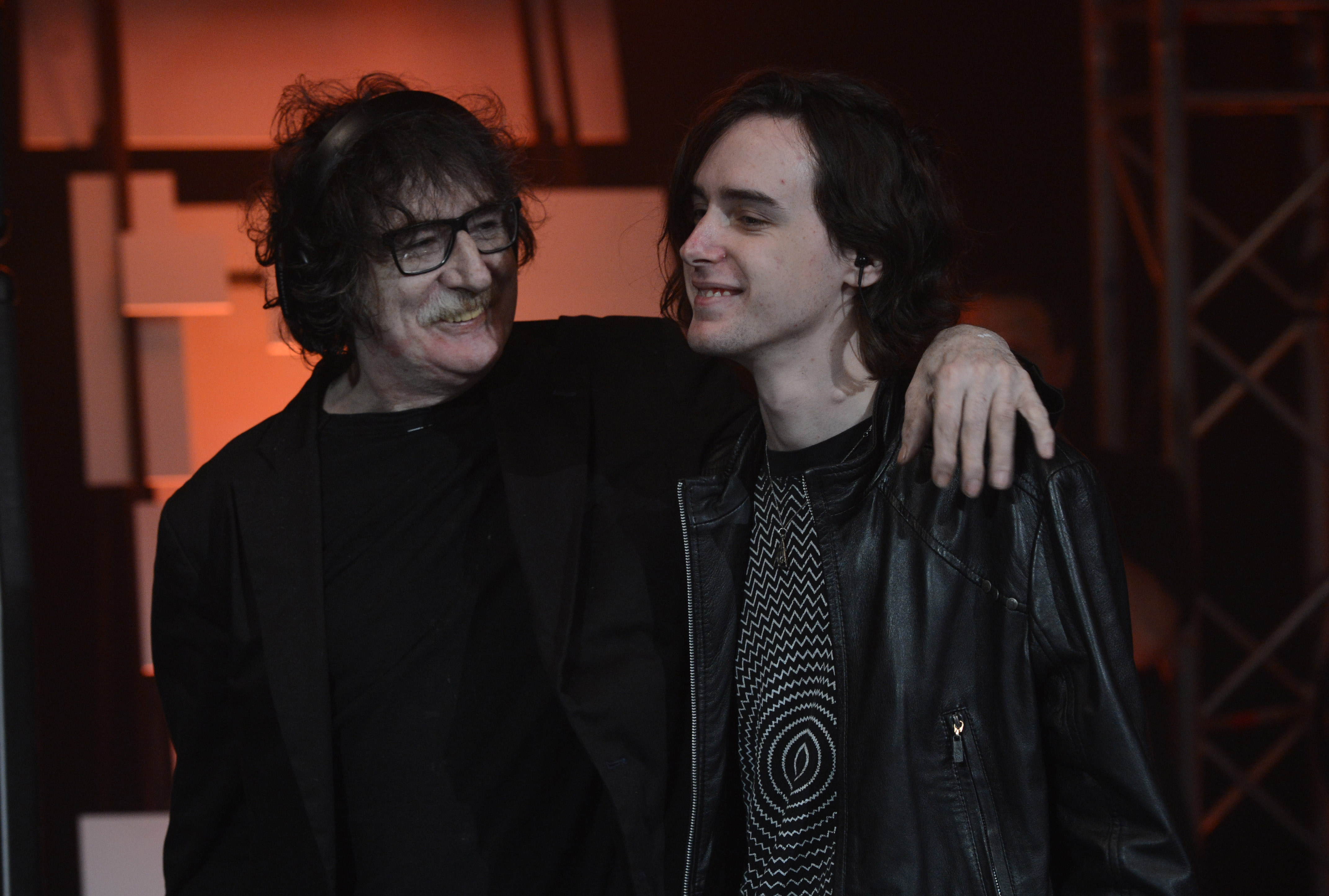 Charly Garcia y Benito Cerati. Homenaje Gustavo Cerati.